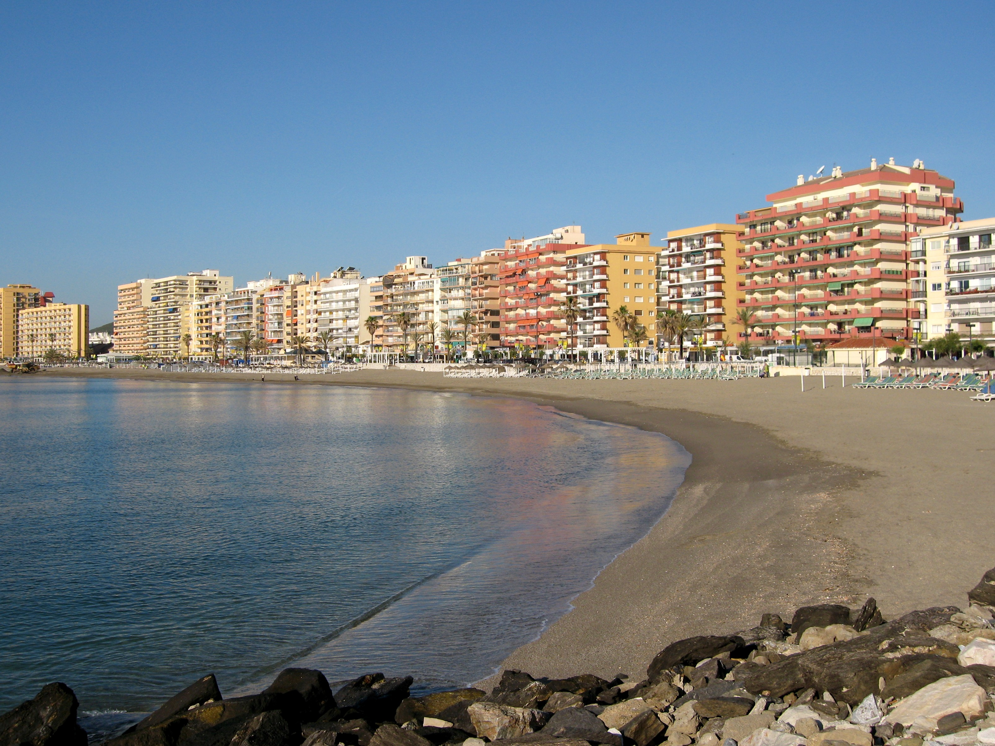 Strand von Fuengirola / Playa de Fuengirola, Provinz Málaga, Andalusien, Spanien